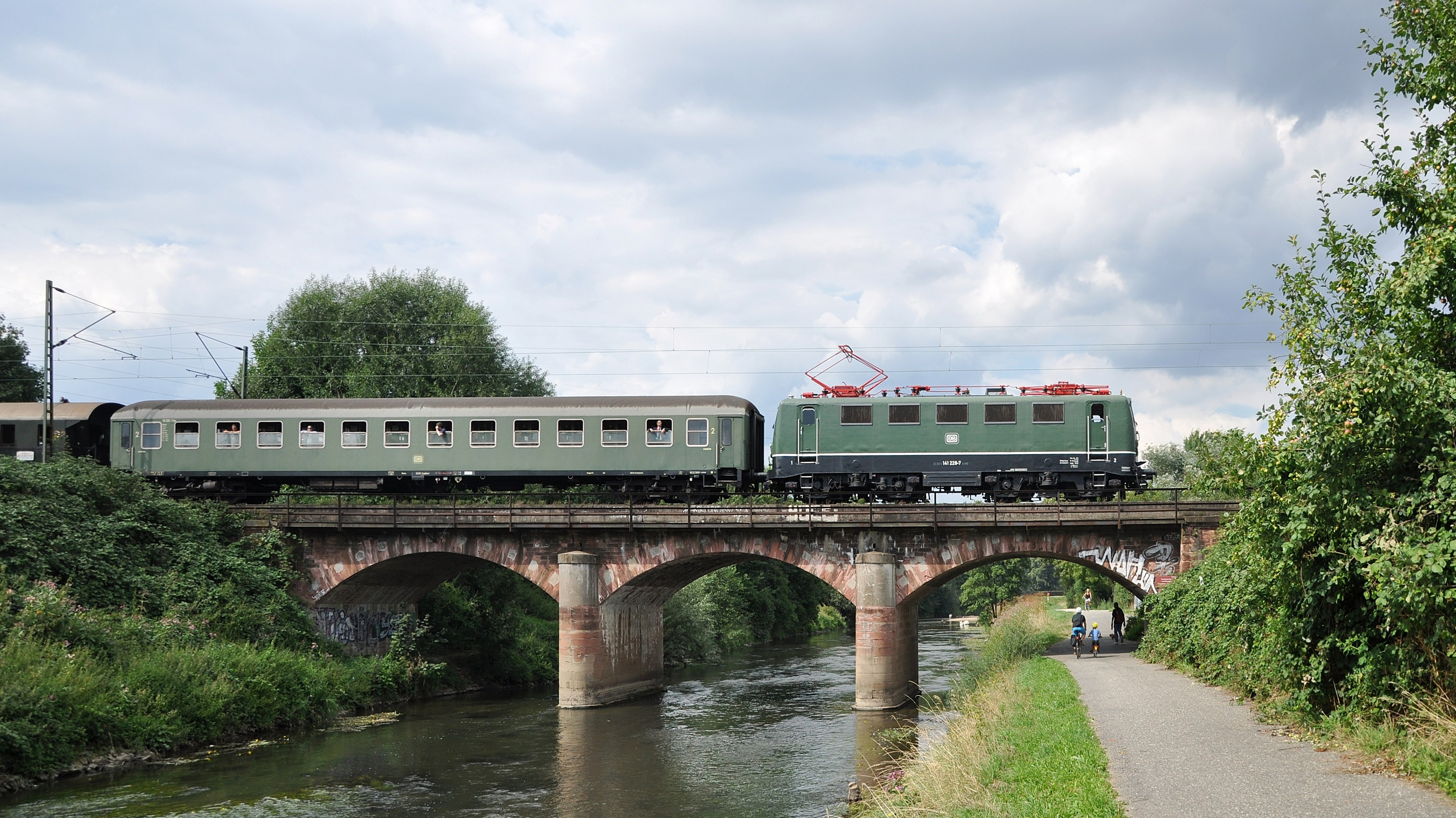 Die Brücke bei Frankfurt-Nied ist die älteste noch in Betrieb befindliche Eisenbahnbrücke in Deutschland (Eröffnung war 1838).